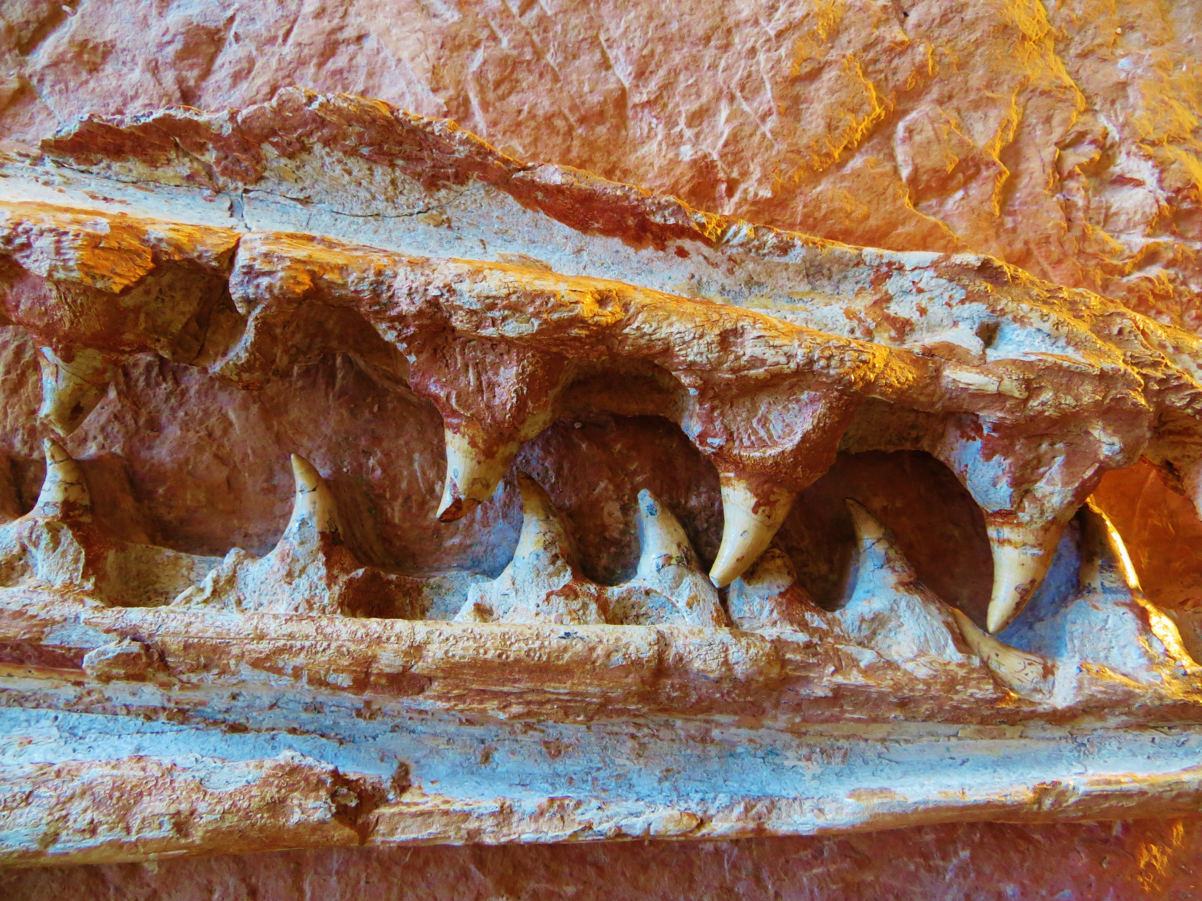 Fossil of Romeosaurus, an extinct reptile - Took the picture at Museo Paleontologico di Sant'Anna d'Alfaedo